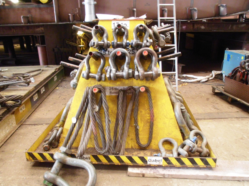 Schäkel auf einer Schiffswerft